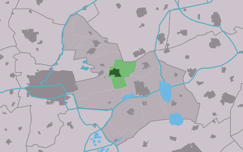 Kaartsje fan himrik fan Hurdegaryp